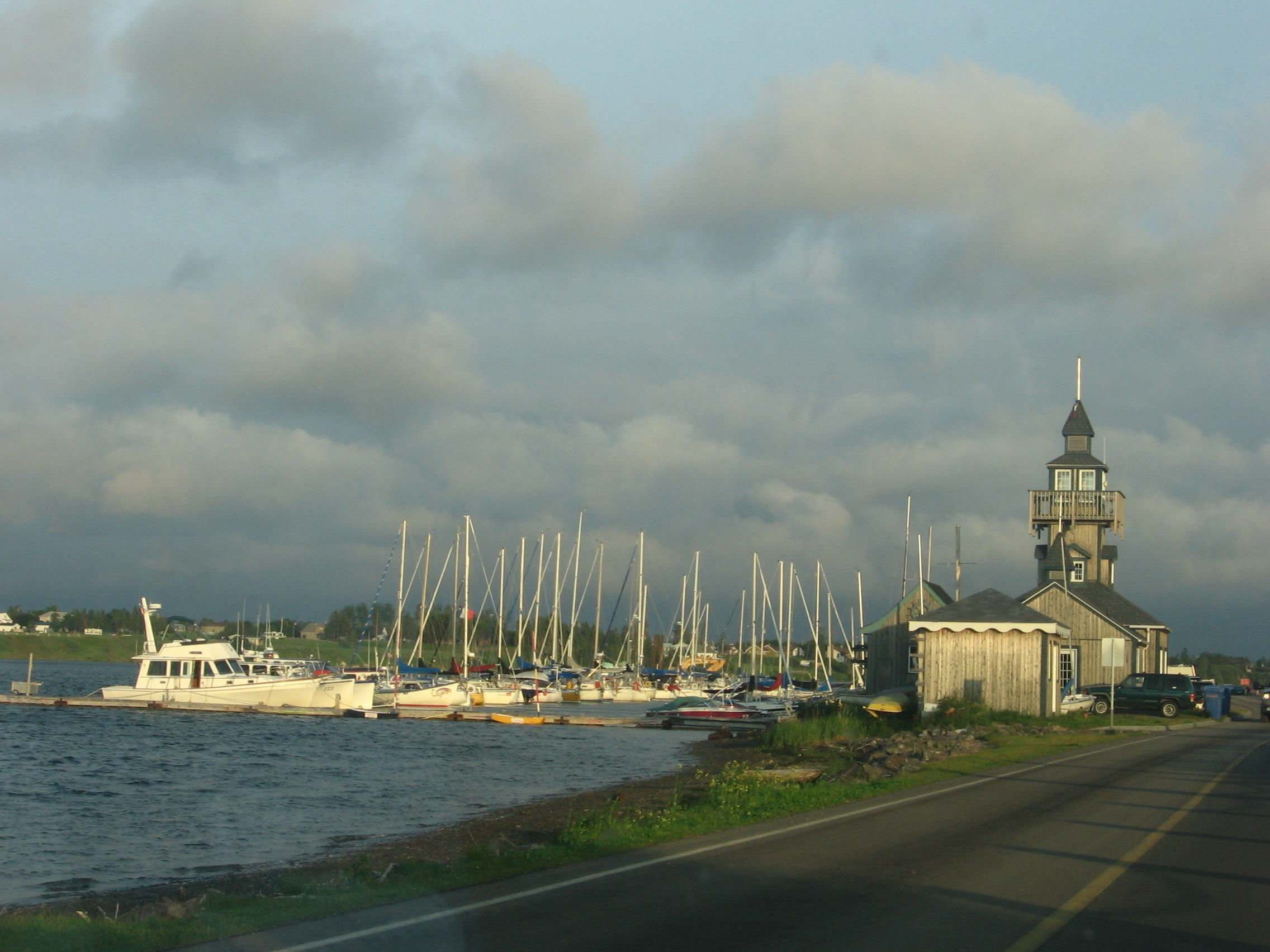 Carleton-sur-Mer